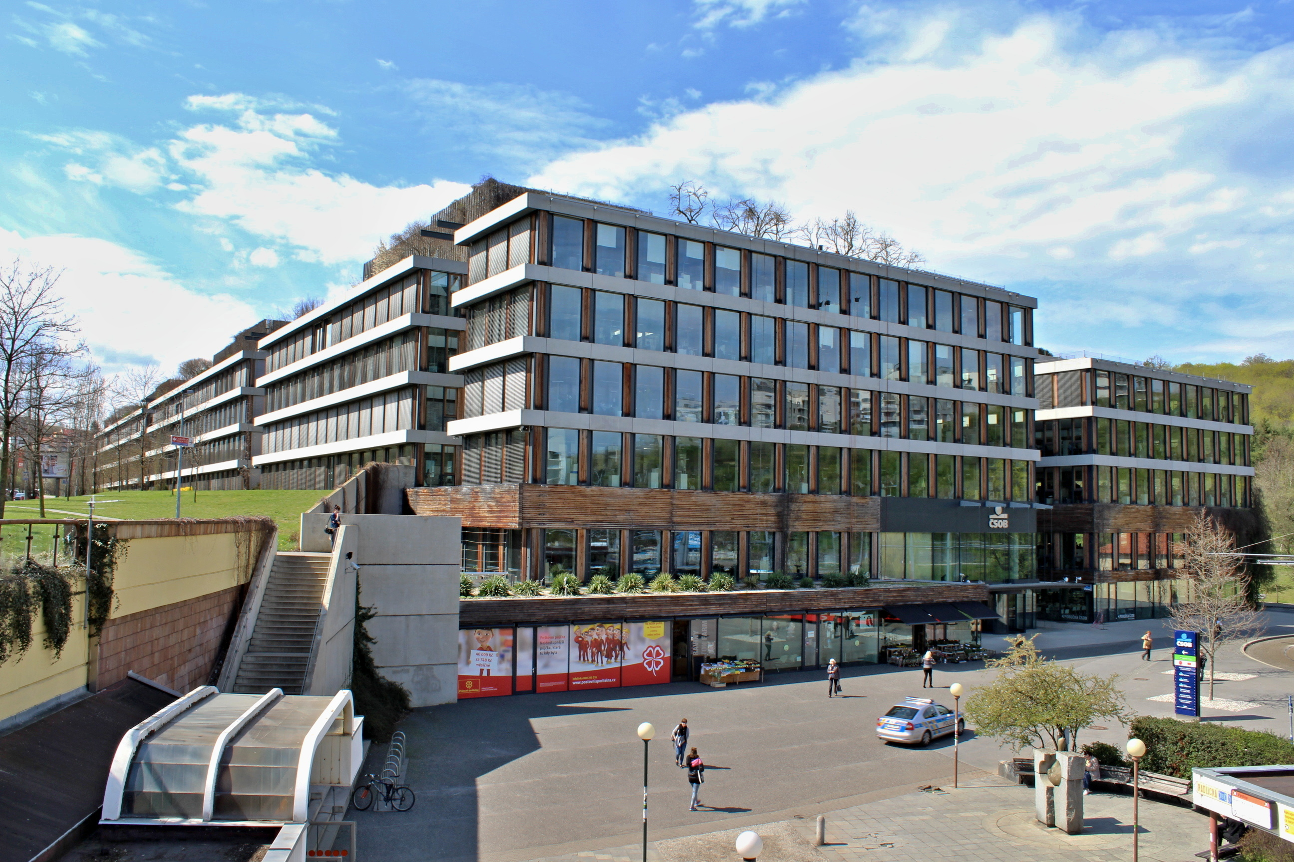 Hlavní budova ČSOB Radlická